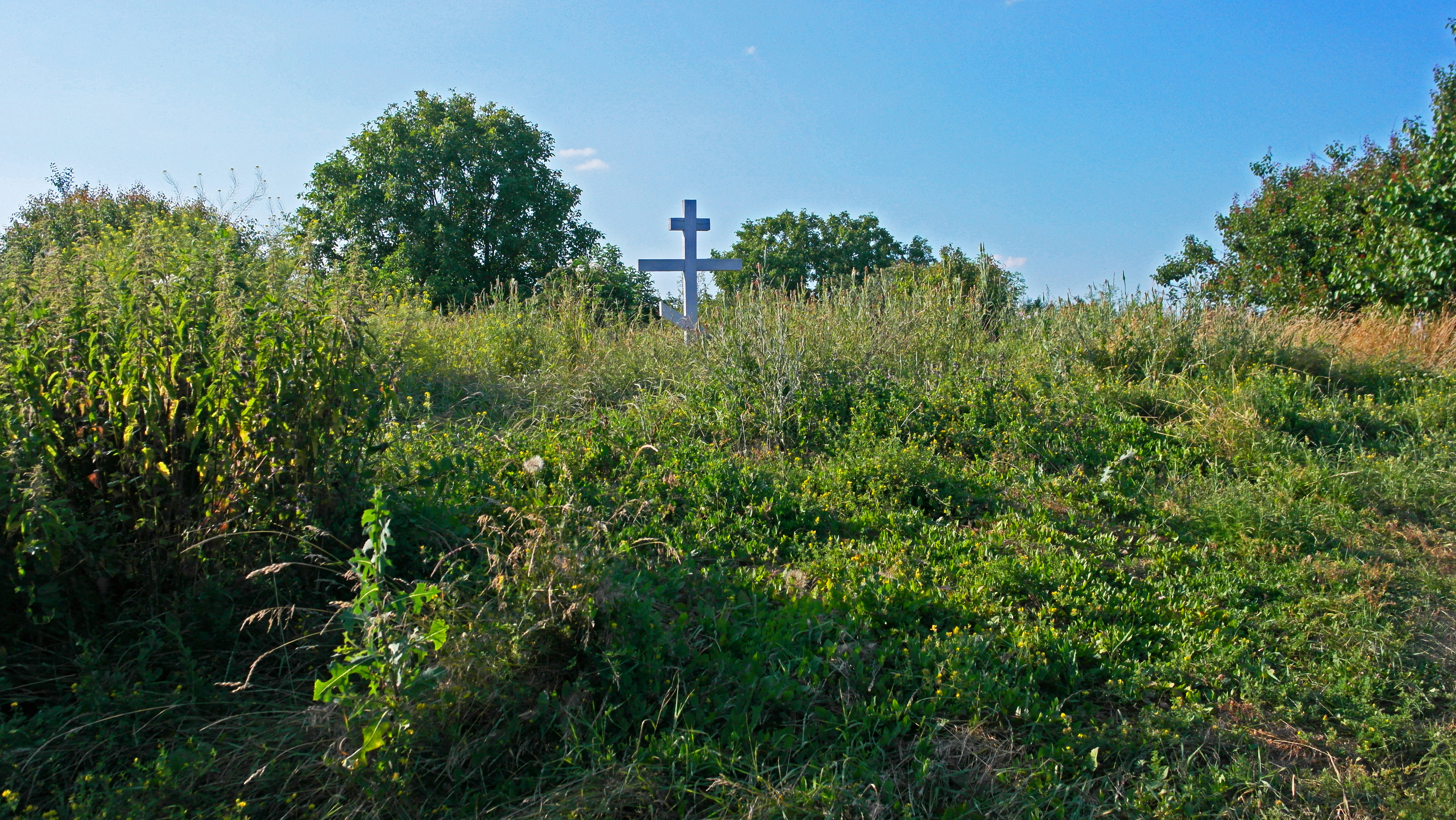 Городище літописного міста Білгорода і могильник, Білогородка